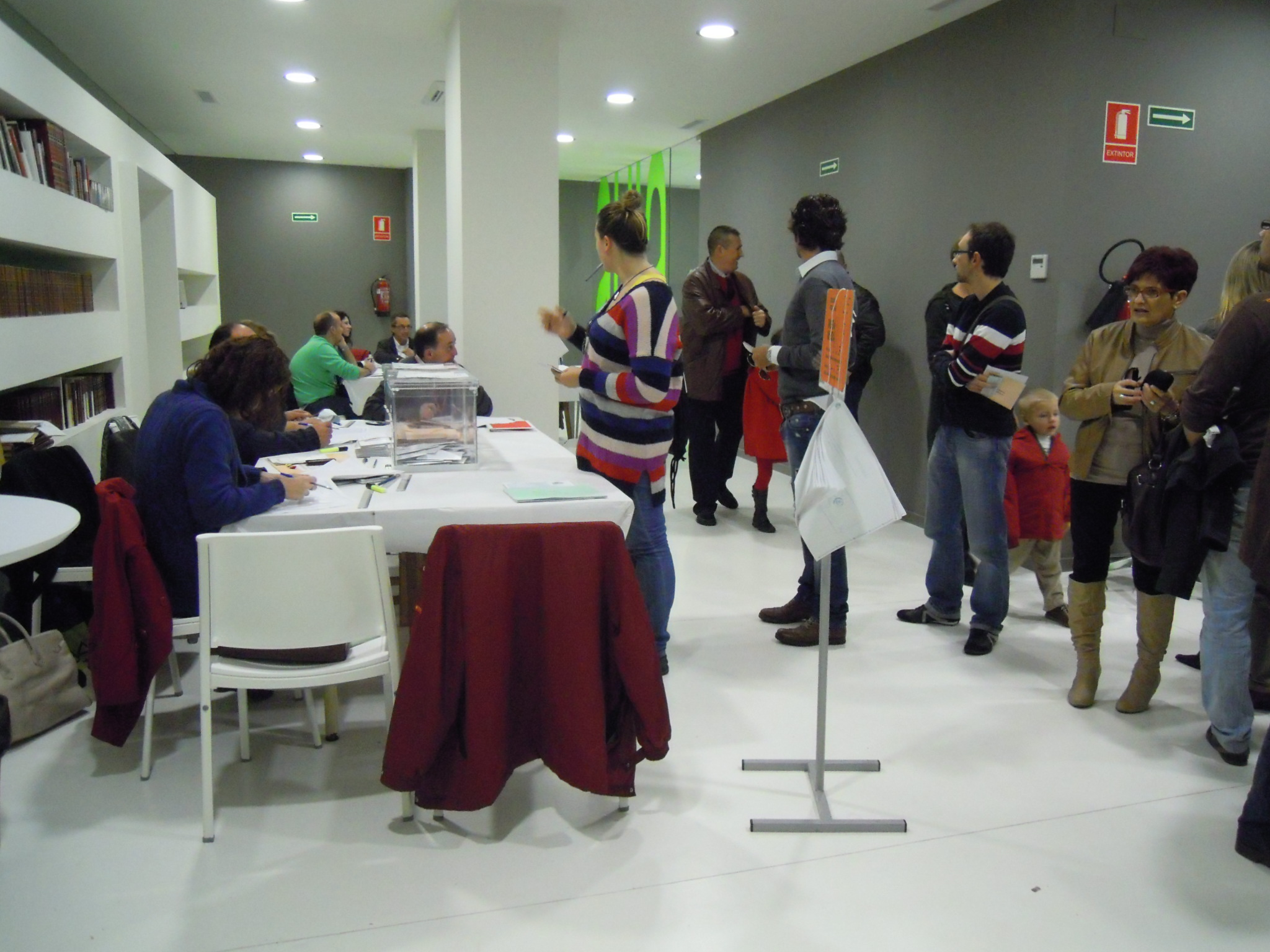 Mesas electorais para as eleccións xerais de España de 2011, no local social do Gorgullón (Pontevedra).